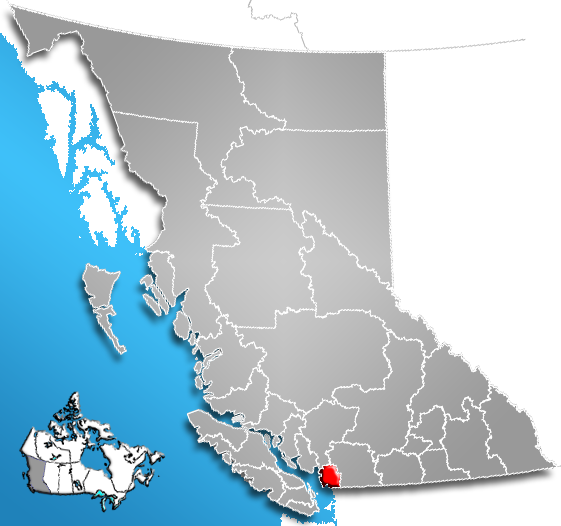 Distrito Regional de Greater Vancouver Location of Greater Vancouver Regional District, British Columbia